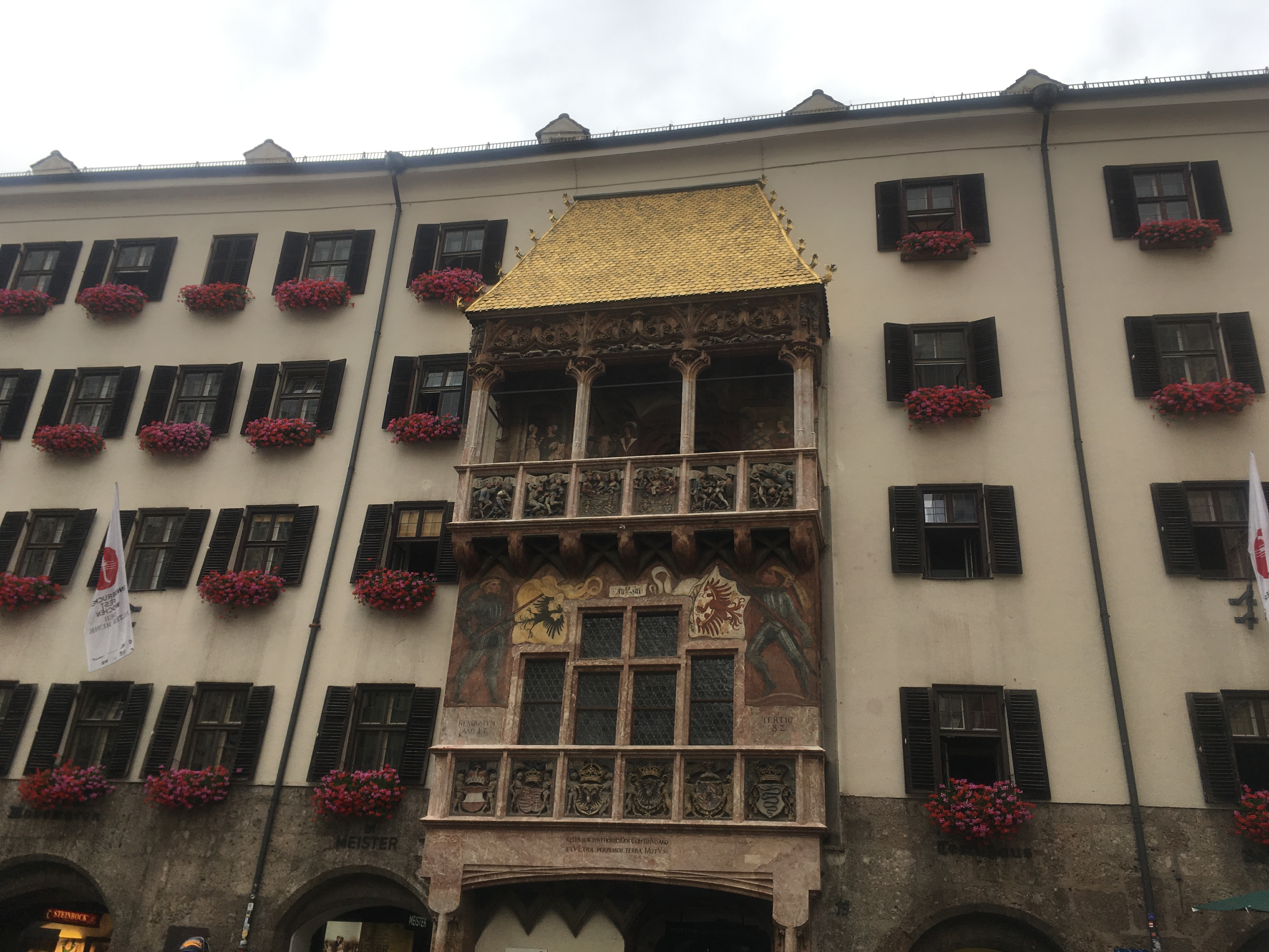 גג הזהב באינסברוק, 2017